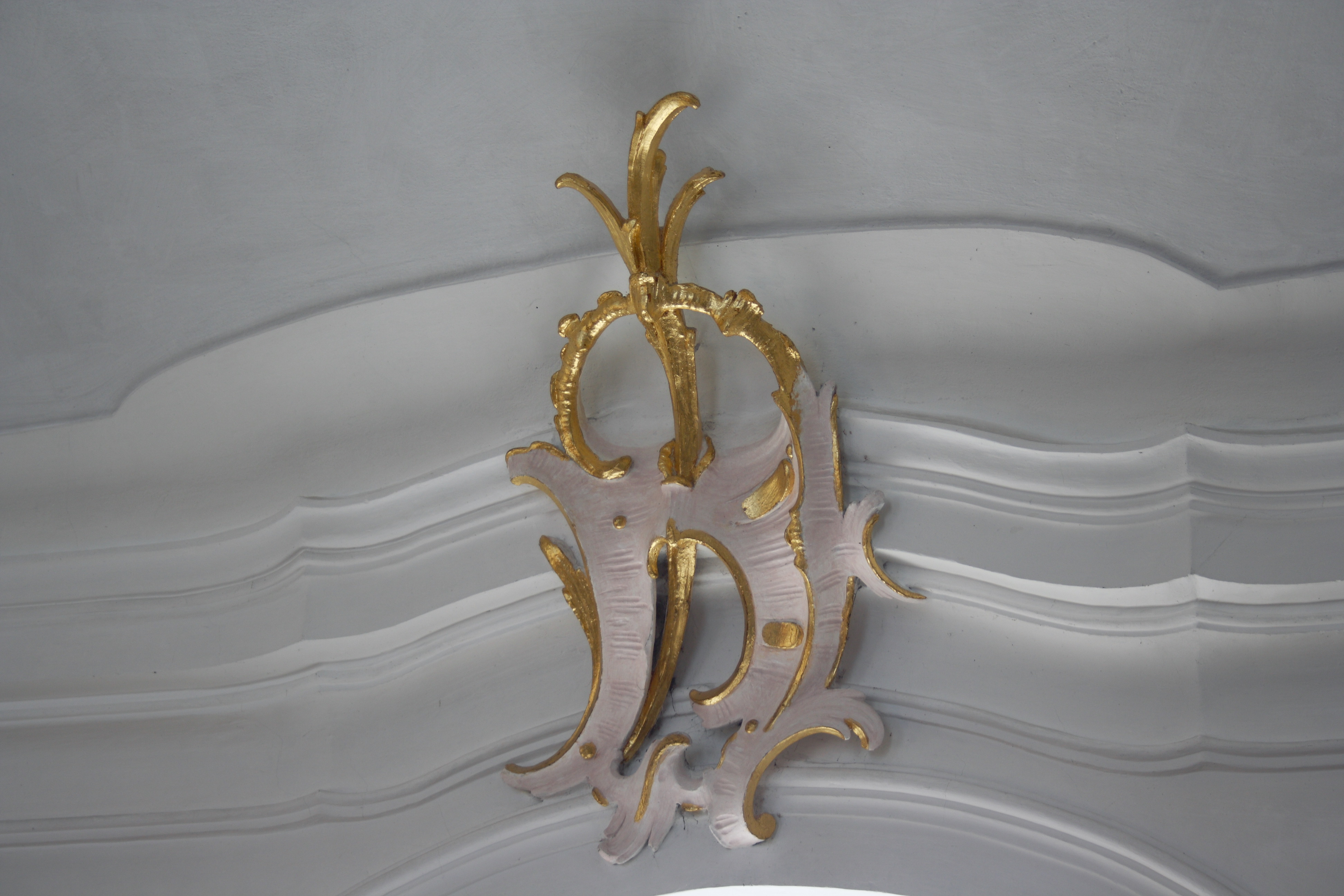 Katholische Pfarrkirche St. Michael in Oberbechingen, einem Ortsteil der Gemeinde Bachhagel im Landkreis Dillingen an der Donau (Bayern), Stuck von 1766, Rocaille